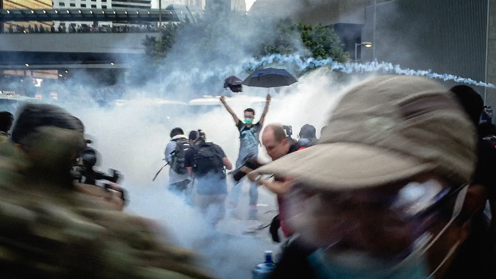 Tear Gas Umbrella Man